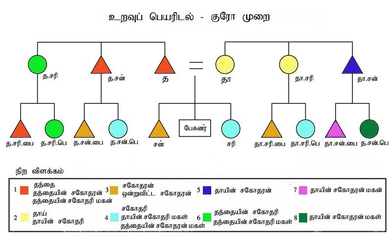 Drawn by the user who uploaded it here.